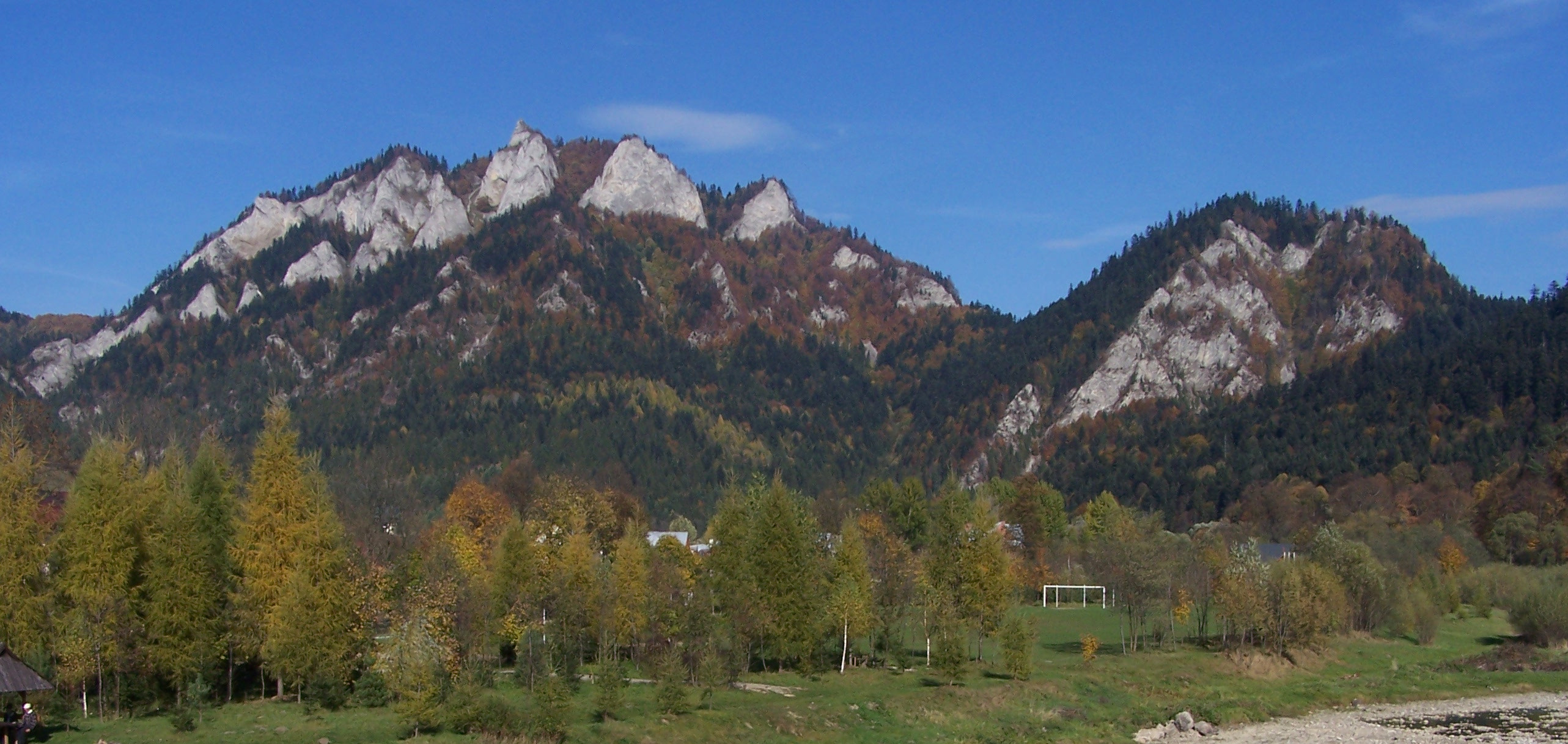 Trzy Korony, Facimiech (Pieniny)